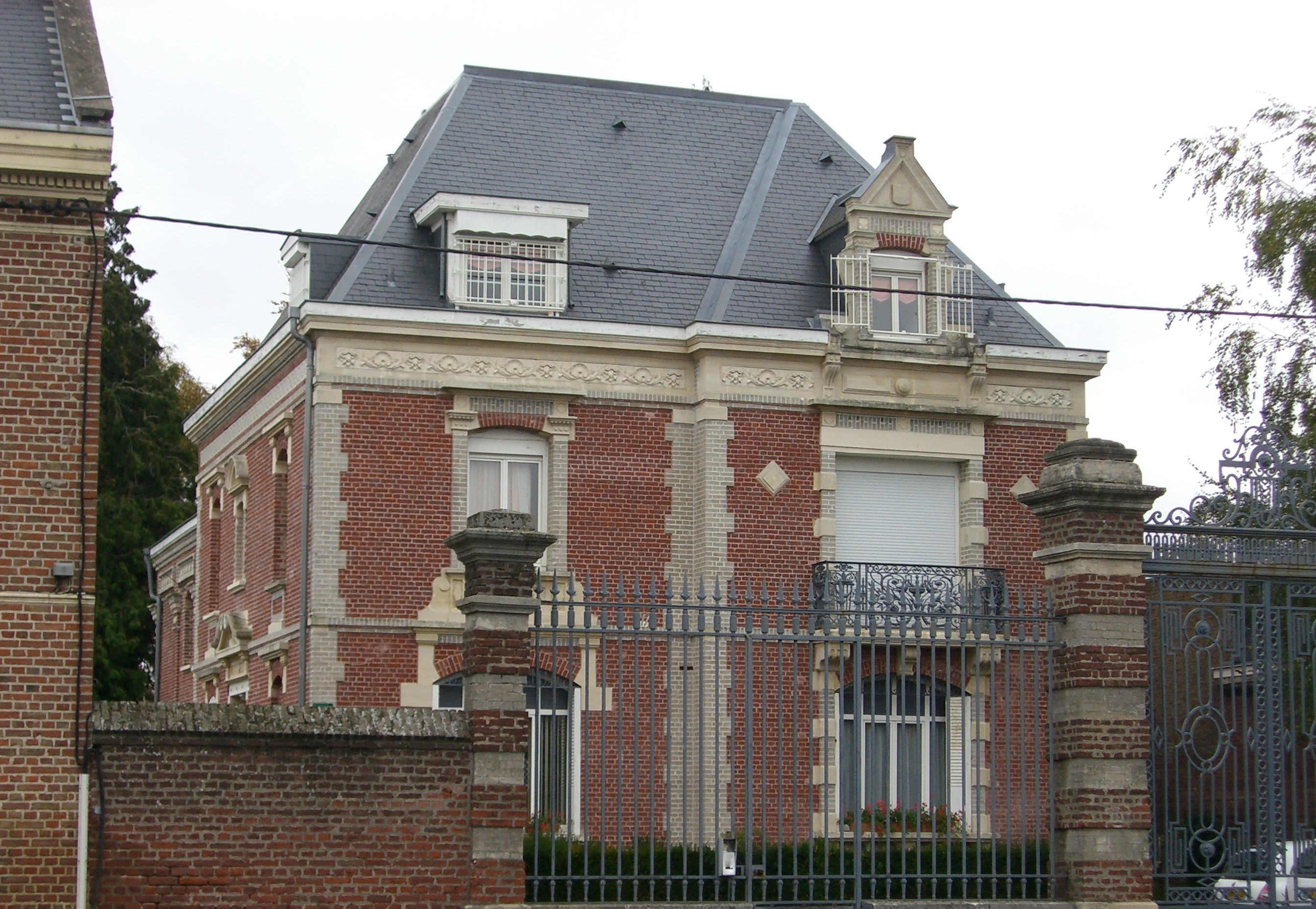 Il s'agit d'une photographie de la demeure qu'Émile Maillard s'était fait construire dans le quartier Saint-Acheul à Amiens à la fin du XIXe siècle et dans laquelle était installé un atelier de 75 m2 sur une hauteur de deux étages. Au tout début du 20e siècle, cette villa est cédée à la famille Devred du fait de revers de fortune du peintre. Fin 1997, elle fait l’objet d’une Déclaration d’Intention d’Aliéner au profit du Ministère de la Justice qui y installe un foyer de réinsertion. Maison sise aujourd'hui au 203 Chaussée Jules Ferry (Amiens)